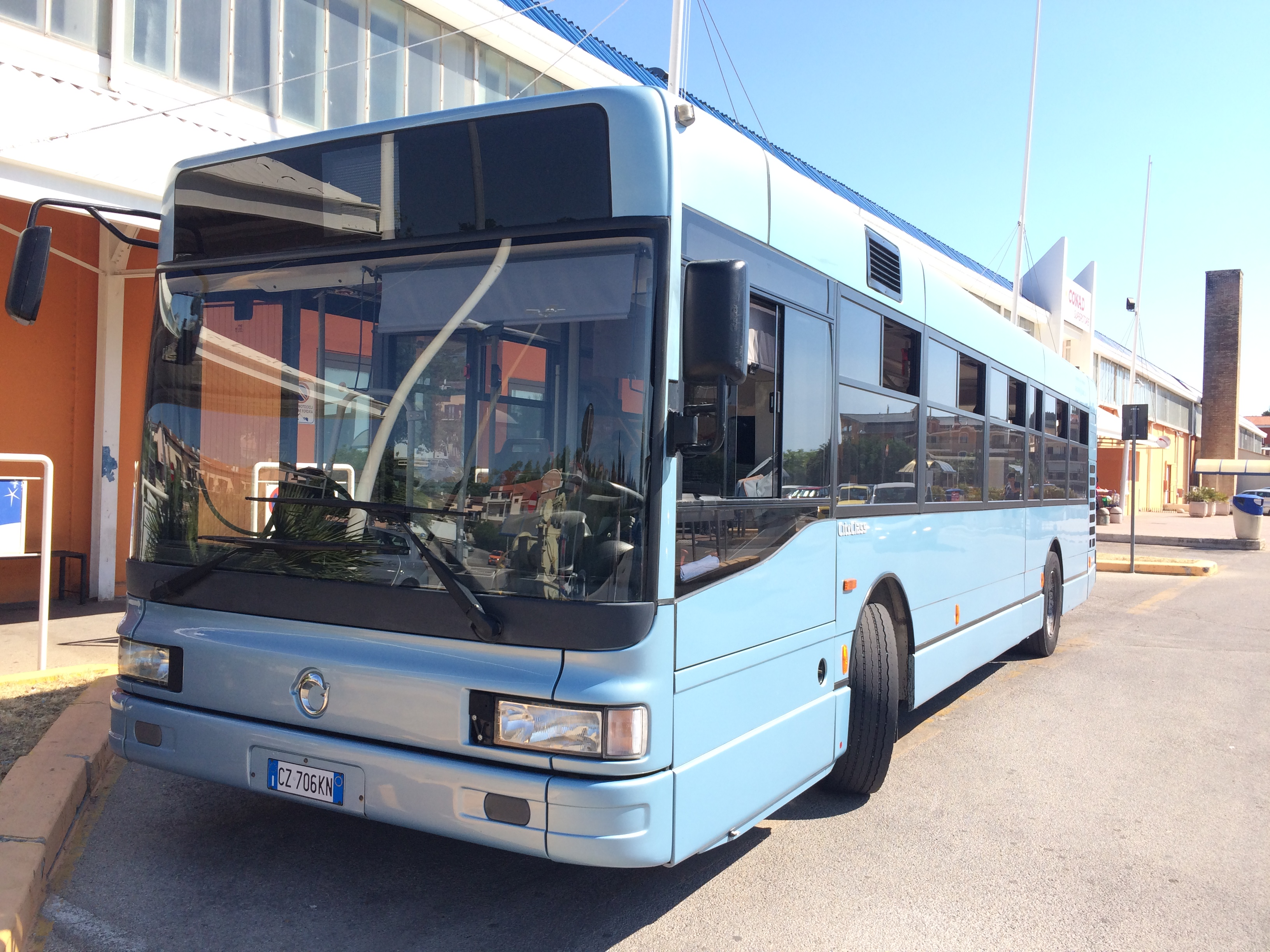 Cityclass 491.10 Irisbus al capolinea di Pianeta . Il capolinea è effettuato dalle linee 1 e 6 .